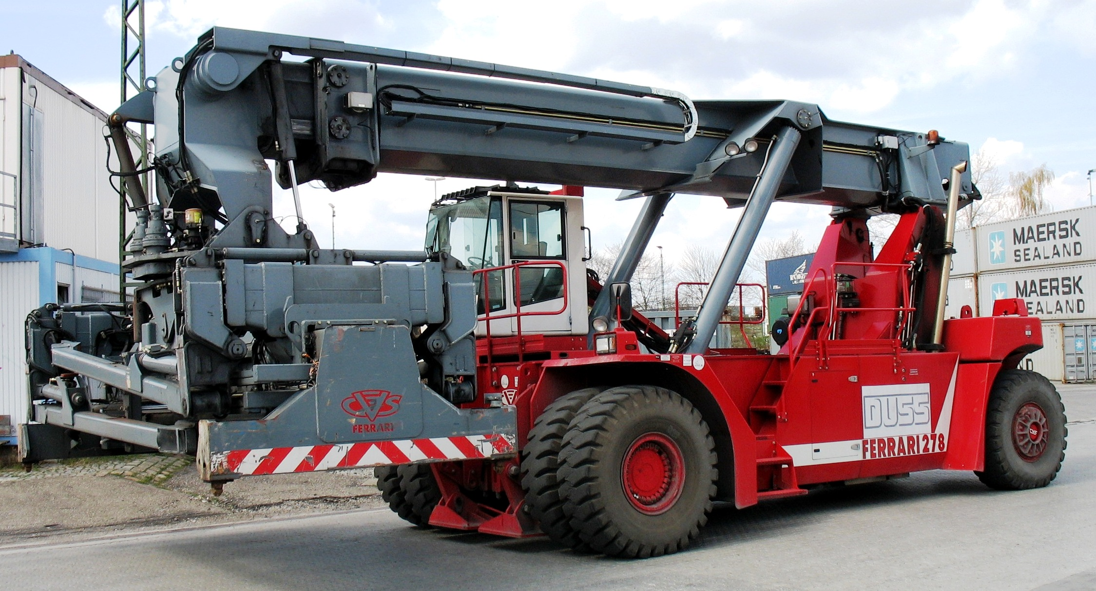 Reachstacker, Bahn-Güterterminal Augsburg Oberhausen